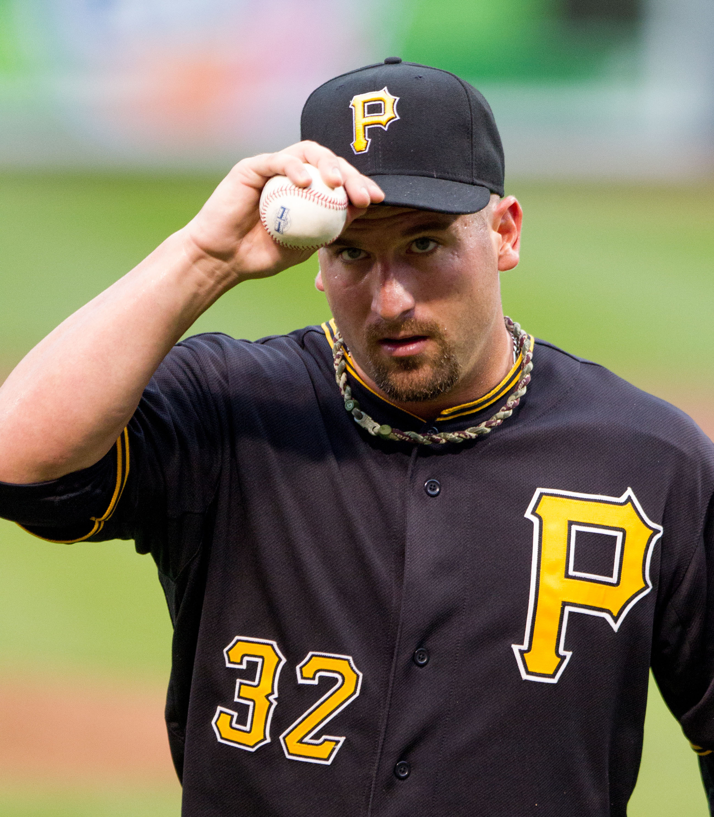 Brad Lincoln